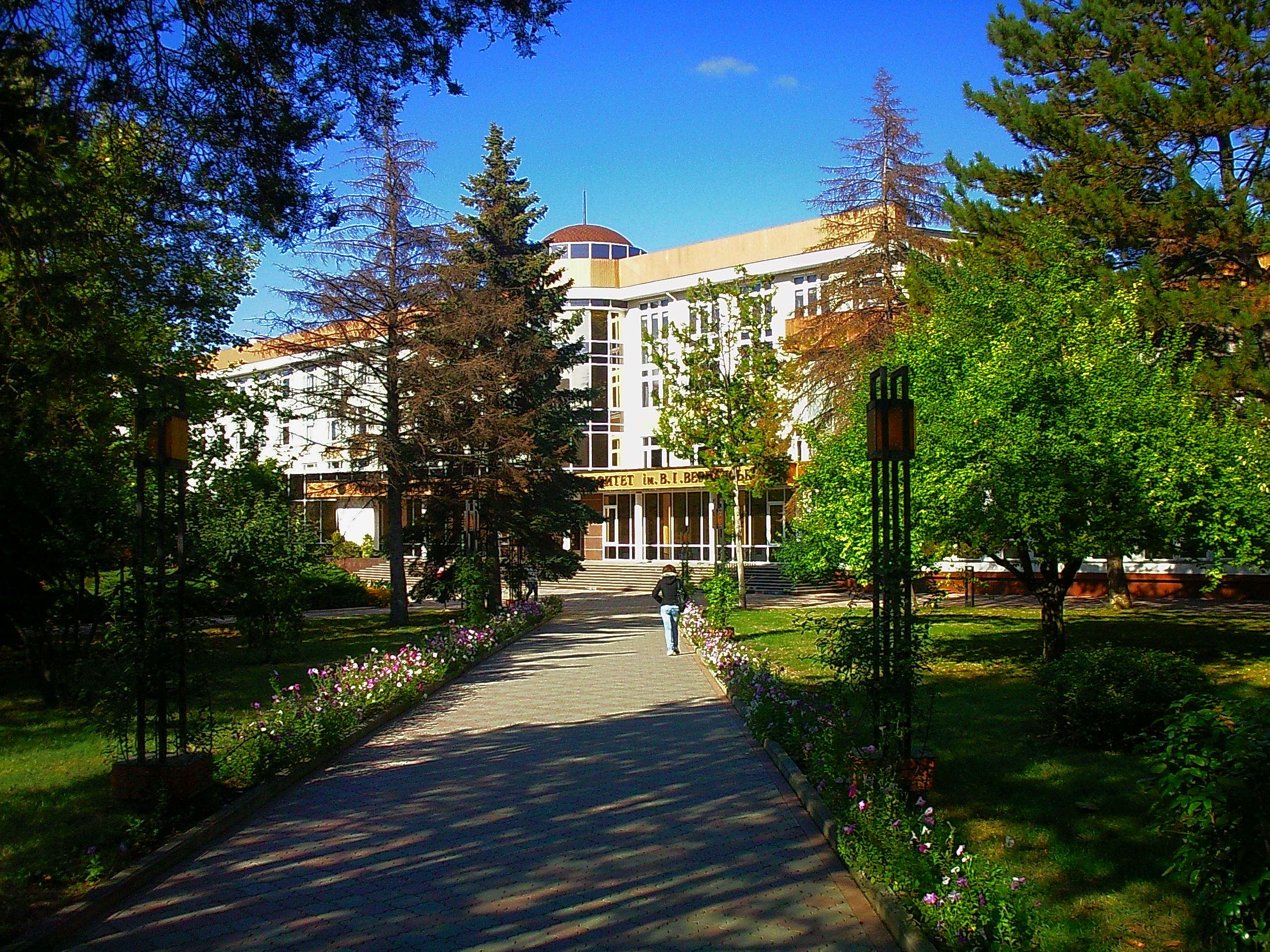 дорожка к главному корпусу